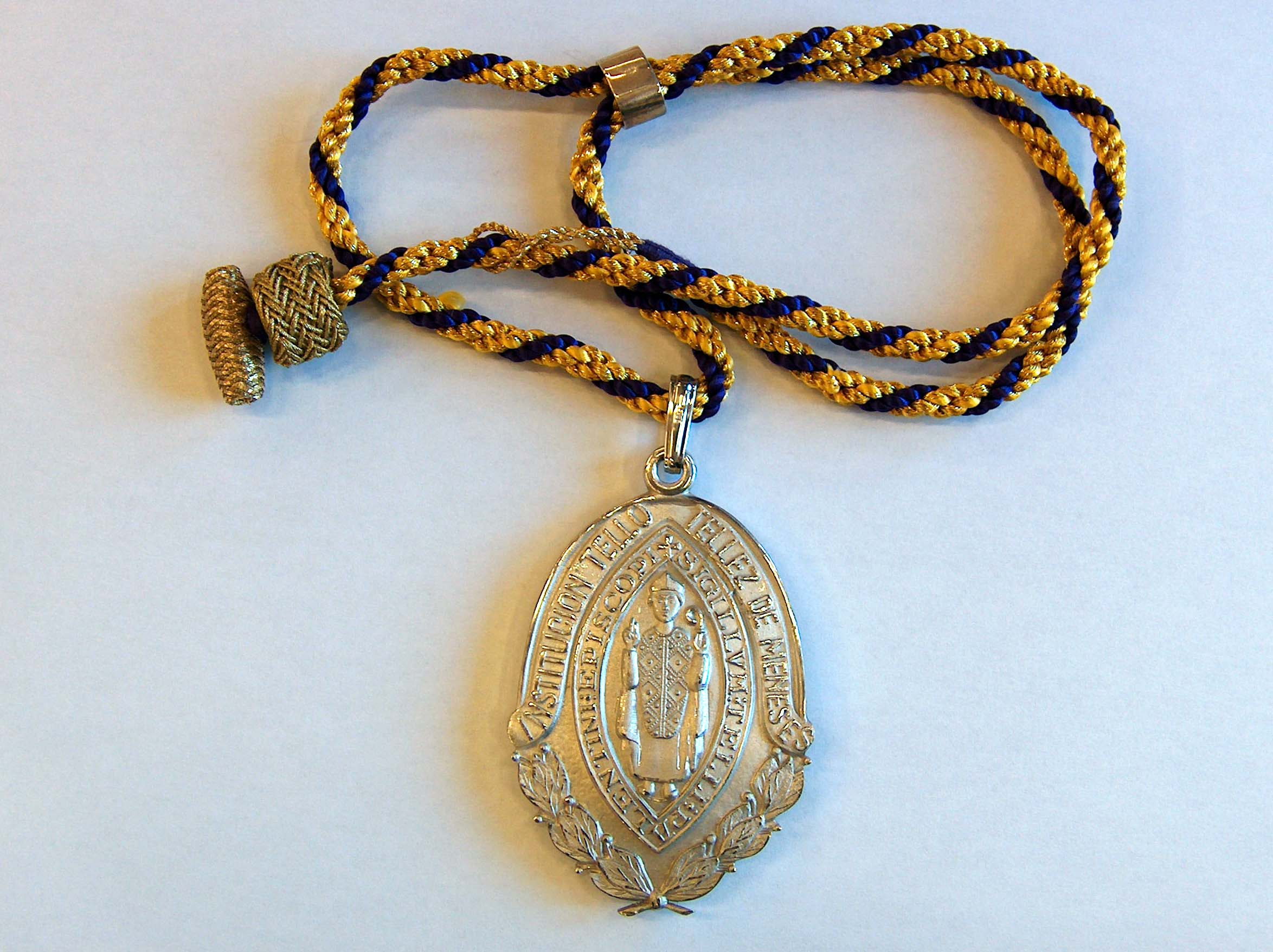 Medalla de la Institución Tello Téllez de Menéses con la que sus académicos ofician cada uno de los actos de la misma.